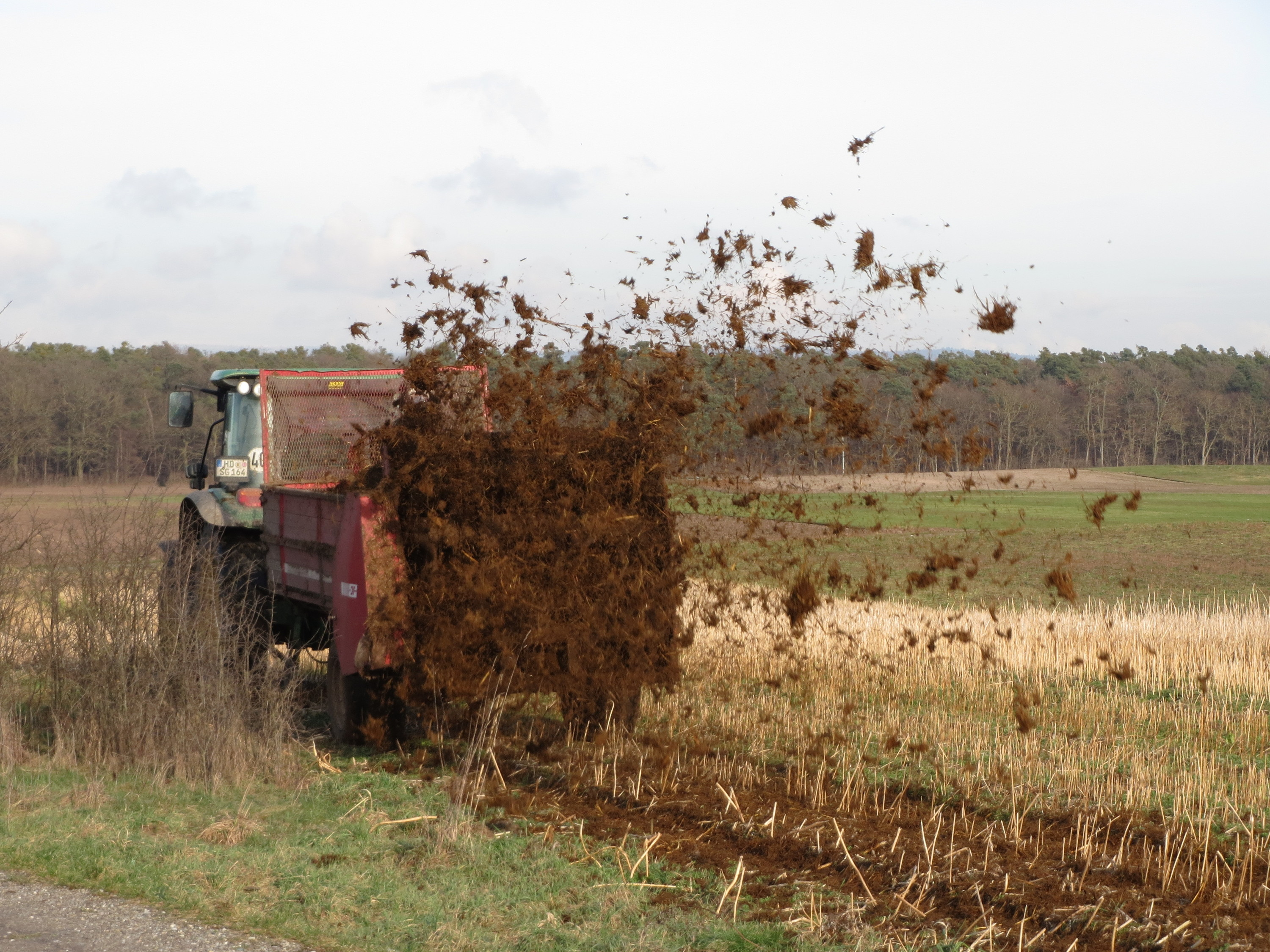 Düngung eines Feldes bei Hockenheim